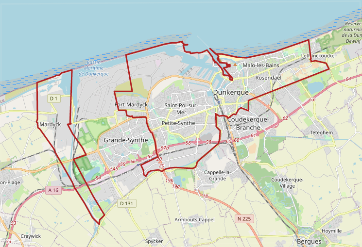 carte réalisée sur umap This map may be incomplete, and may contain errors. Don't rely solely on it for navigation.